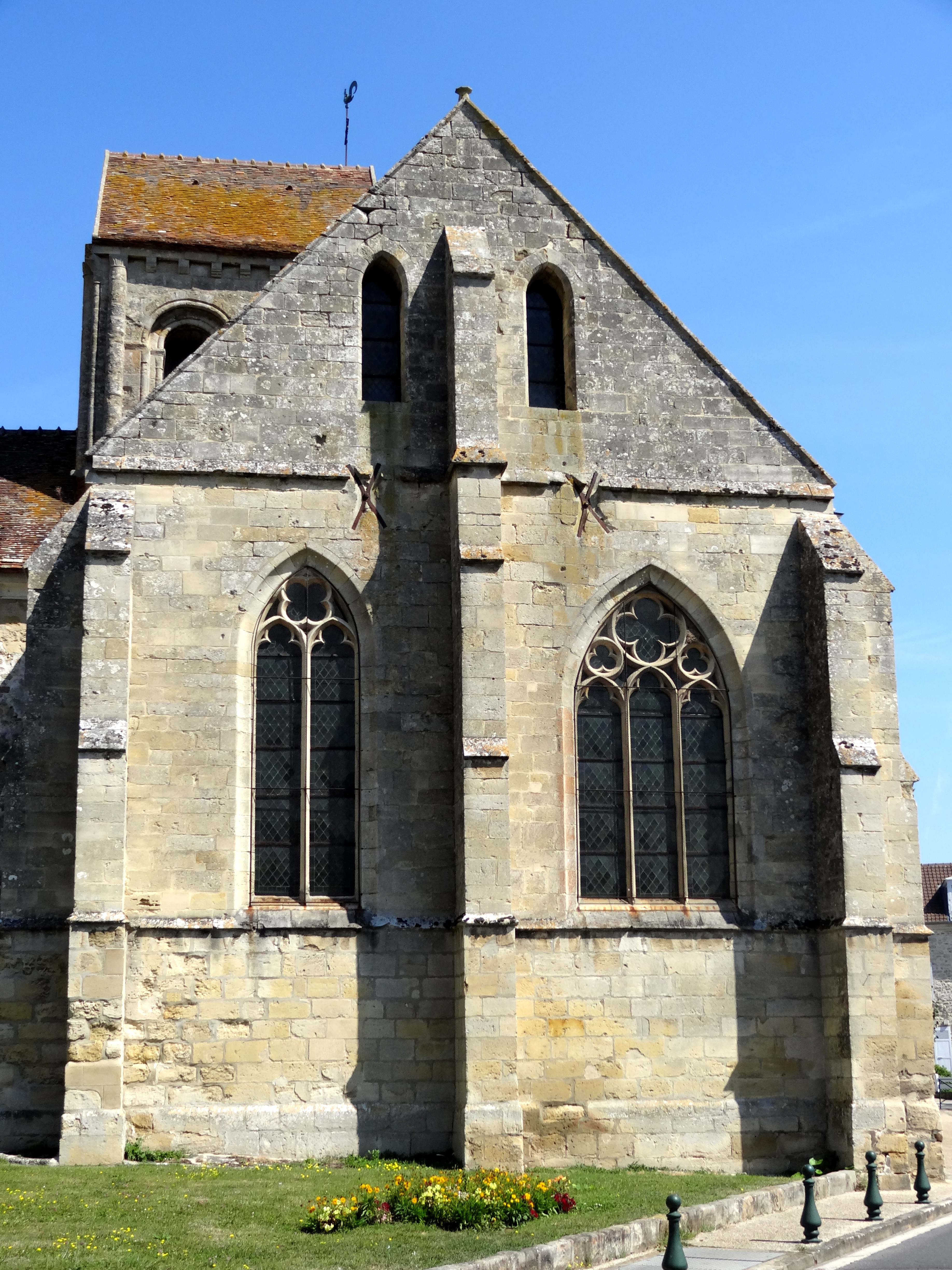 Église Saint-Sulpice de Seraincourt - voir titre.